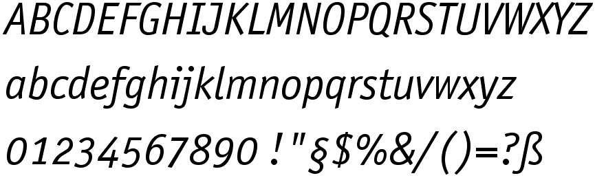 Schriftartenmuster der Officina sans italic